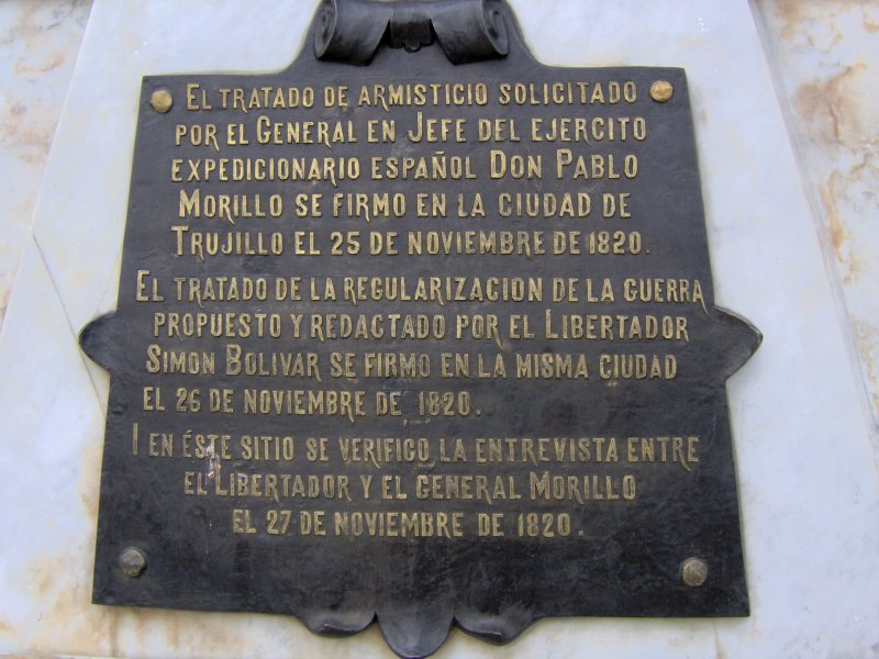 Placa ubicada en el monumento al abrazo de Bolívar y Morillo, en Santa Ana de Trujillo, Venezuela.